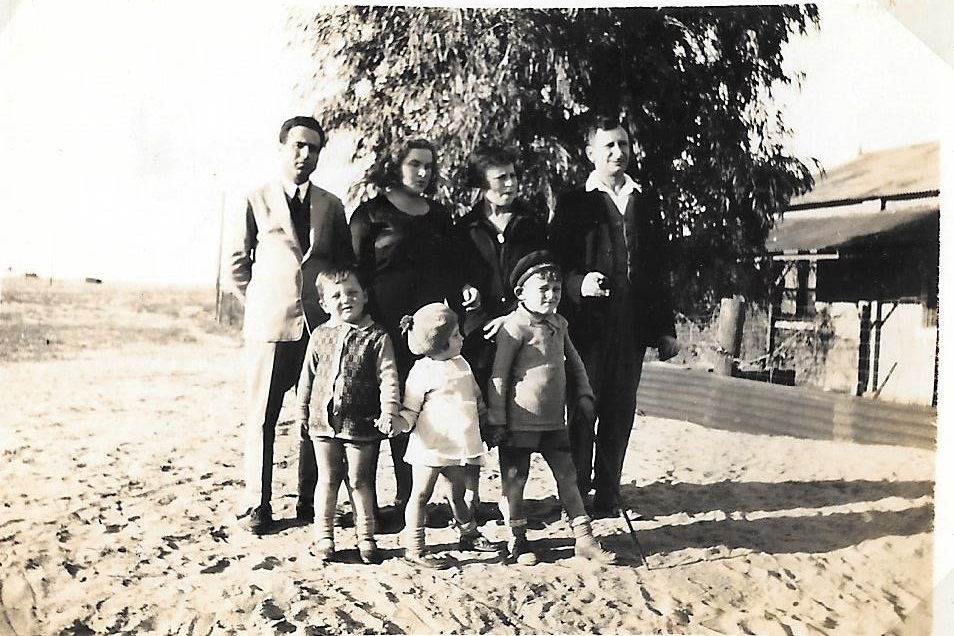 משפחת כהן עוזבת את קנטרה 1 ספטמבר 1931